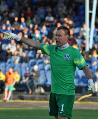 Алексей Рогачев в составе "Балтики"